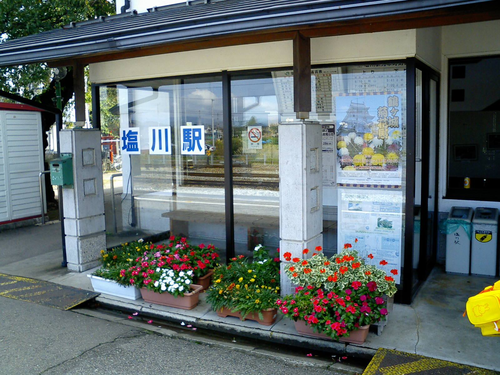 塩川駅1番線にあるガラス張りの待合室